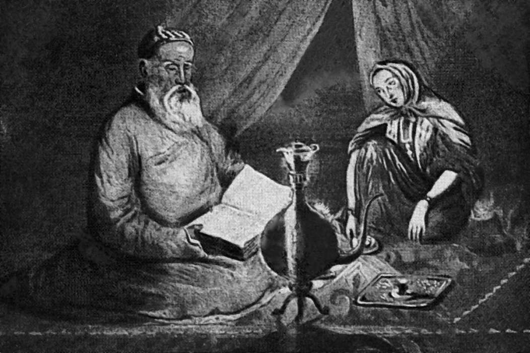 "У юрце". З ілюстрацыі да кнігі "Жыццё кіргізскіх стэпаў"